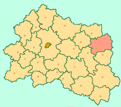 Orel Oblast map by Al Silonov Карта районов Орловской области